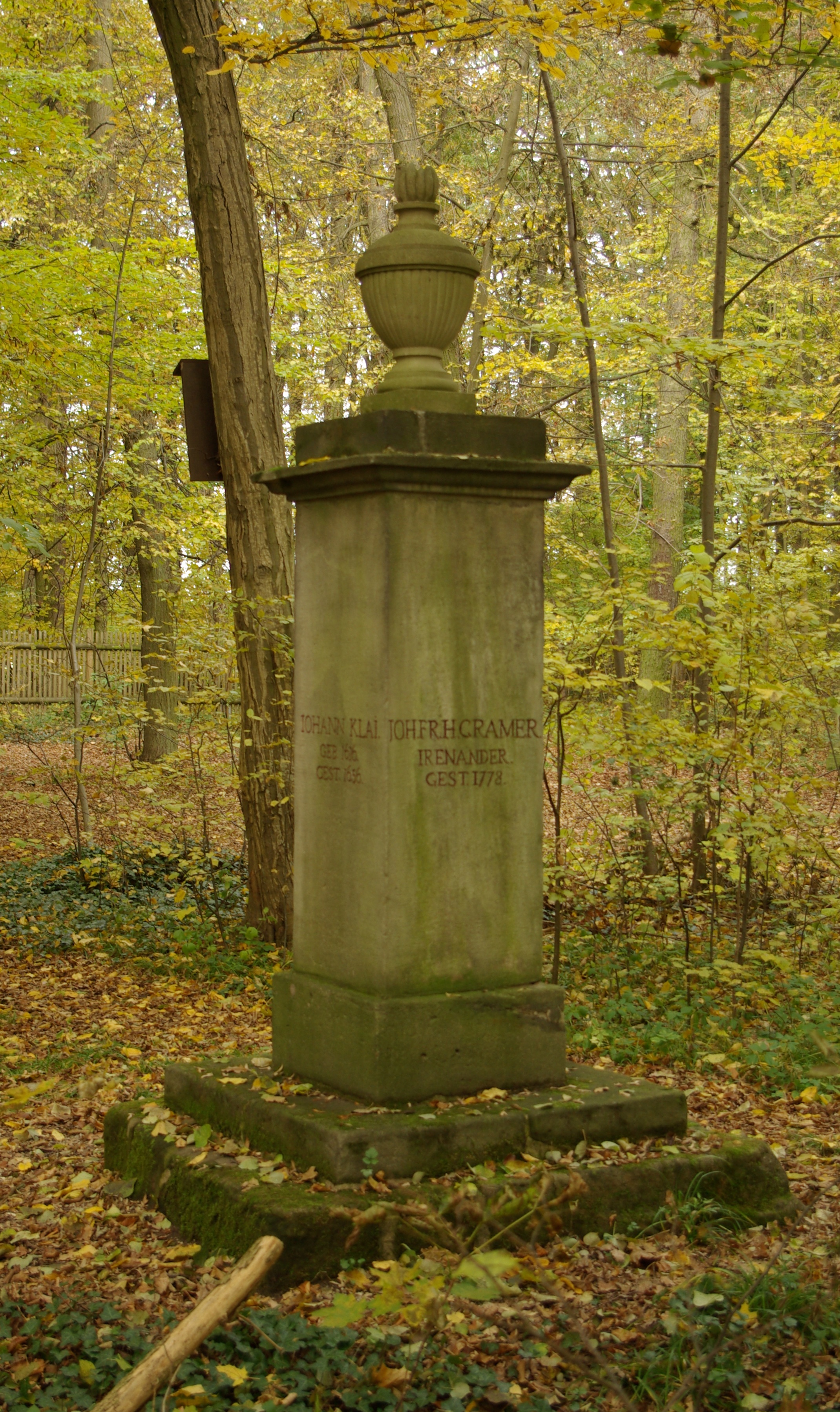 Gedenkstein für Georg Philipp Harsdörffer, Johann Klaj, Johann Friedrich Cramer und Sigmund von Birken im Irrhain bei Kraftshof. Dieser Teil der Anlage wurde als Scheinfriedhof gestaltet.